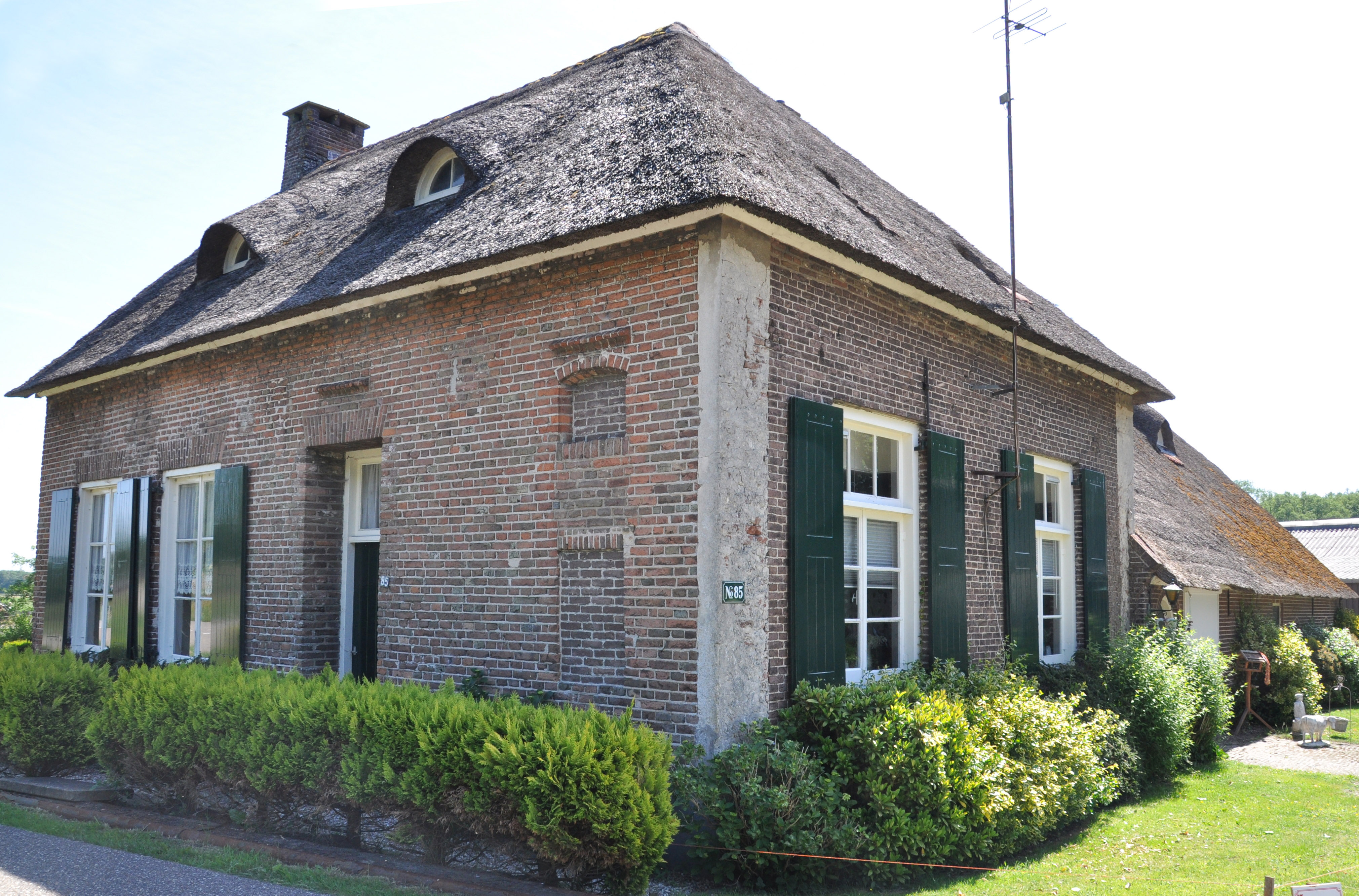 Middeleeuwse boerderij te Wapenveld, gem HeerdeUnknown medieval farm-cloister wapenveld, heerde, the netherlands